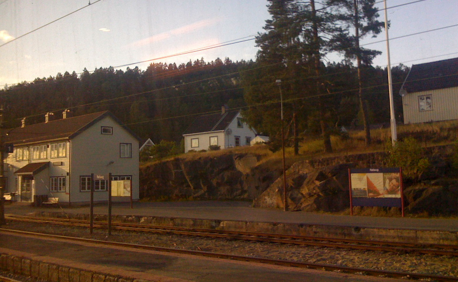 Nelaug Stasjon på Sørlandsbanen.